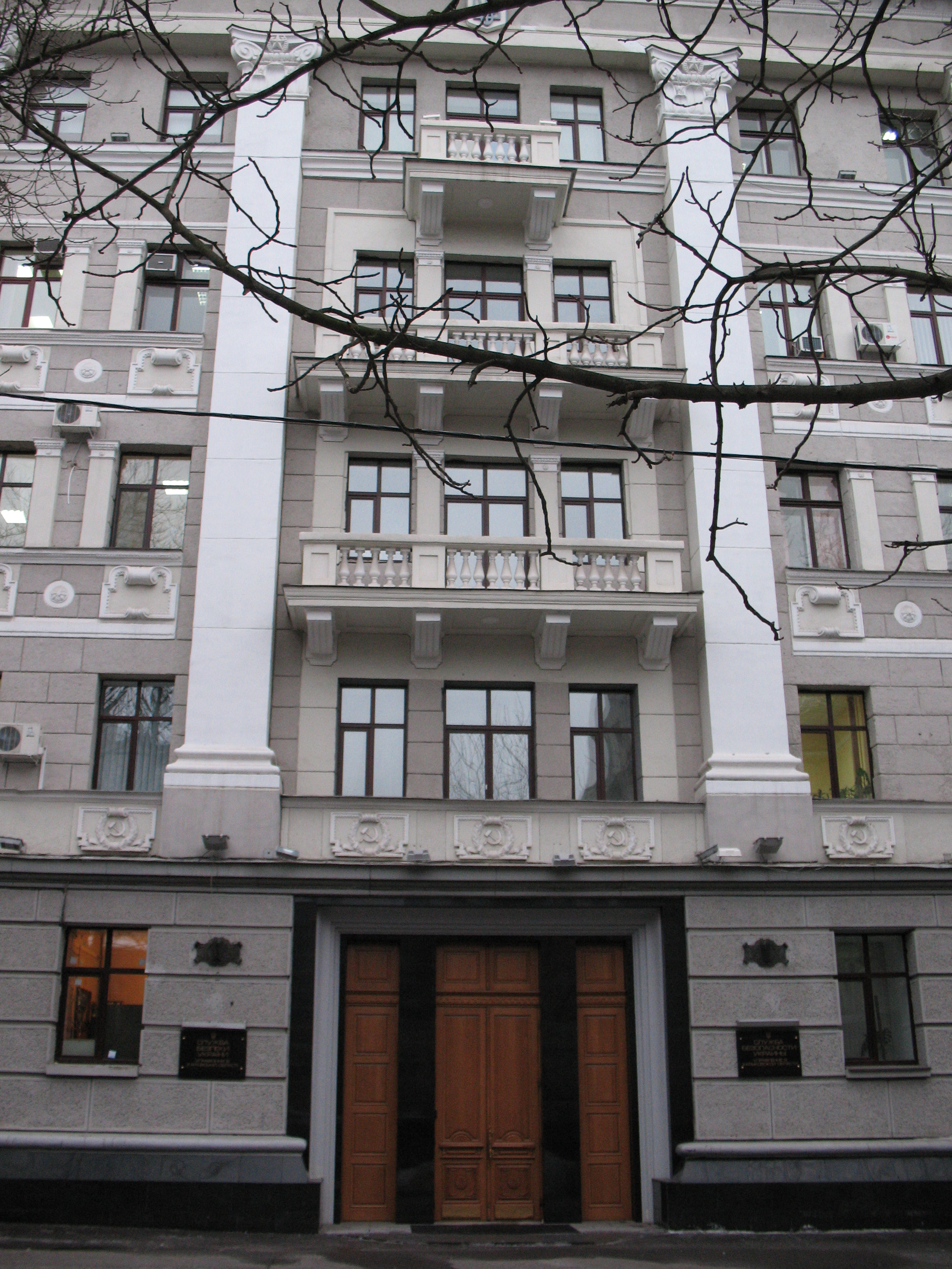 Здание областного управления СБУ Харьков. Вид с улицы Мироносицкой